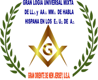 gran logia universal mixta de habla hispana del estado de New Jersey